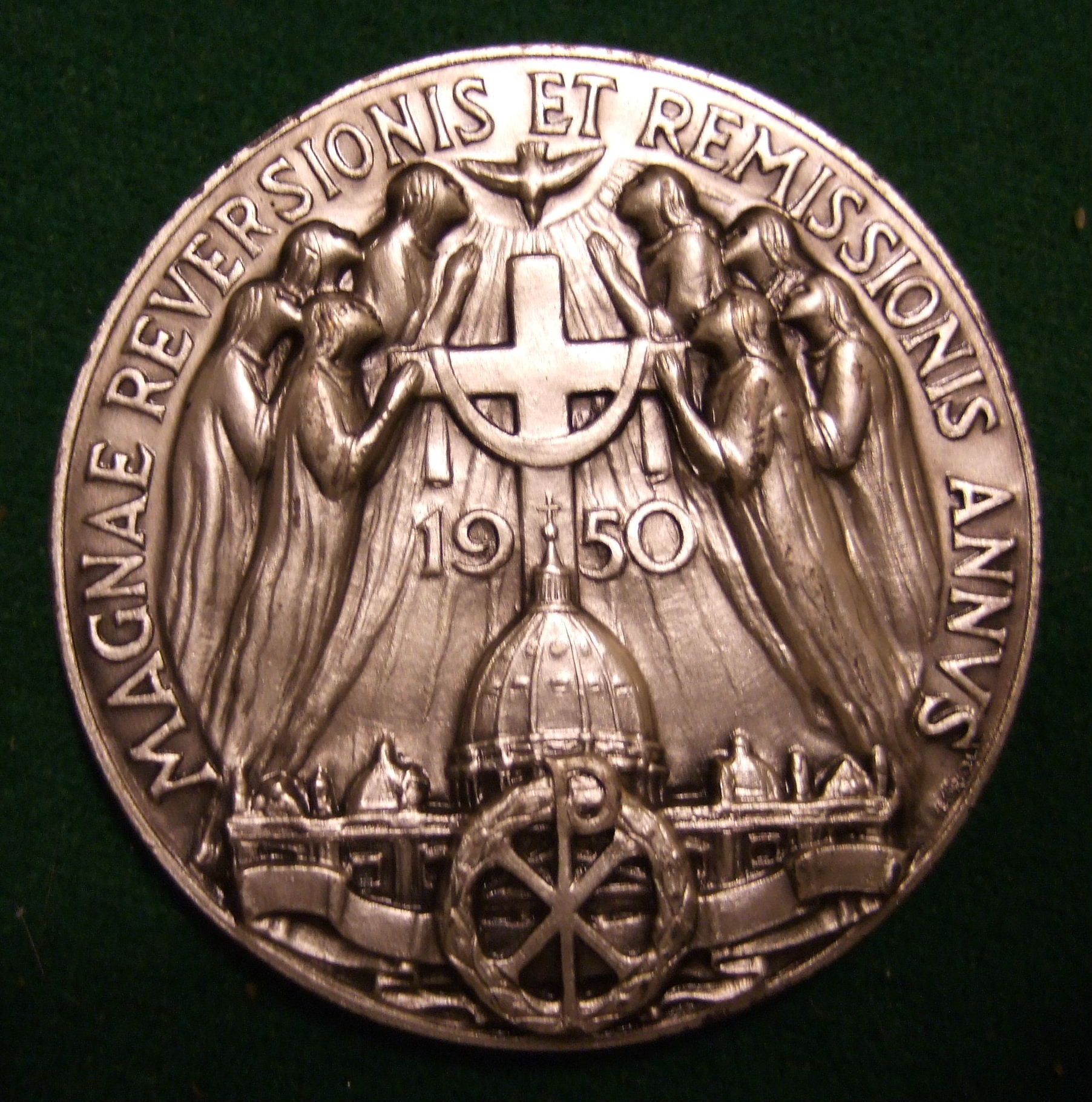 POPE PIUS XII 1950 MID CENTURY MEDALLION b